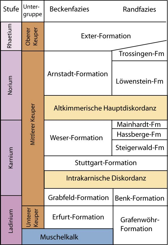 Lithostratigrafie des Keupers im Germanischen Becken